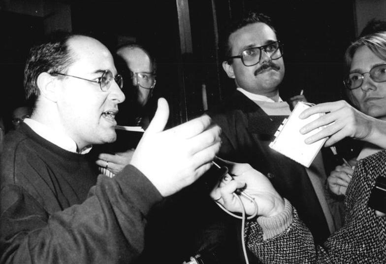 ADN- Klaus Franke-19.10.90- Berlin: Polizei- und Kriminalbeamte haben in der Nacht zum Freitag das Haus des PDS-Parteivorstandes in Berlin umstellt und ohne richterlichen Durchsuchungsbefehl durchsucht. Die rund 100 bewaffneten und mit kugelsicheren Westen ausgestatteten Beamten besetzten alle Ein- und Ausgänge sowie im Inneren des Gebäudes Fahrstuhl- und Zimmertüren. Parteichef Gregor Gysi (l.) hat nach seinem Eintreffen die Besetzung als "ungesetzlich" bezeichnet. Er protestierte gegen die Vorgehensweise, da der Vorwurf der Untreue eine solche Aktion nicht rechtfertige.